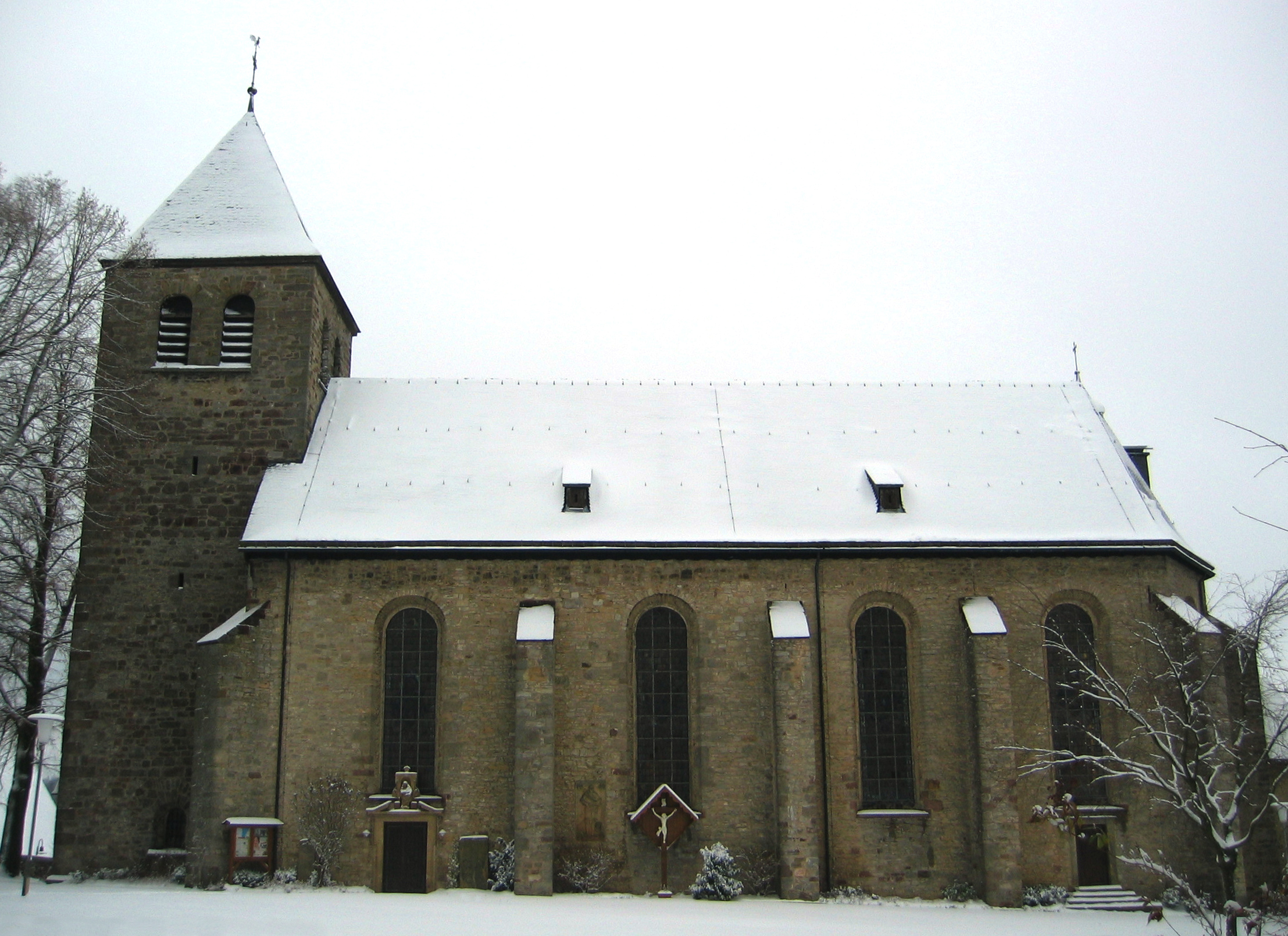 Südseite der Mariä-Himmelfahrt-Kirche, Pömbsen, Bad Driburg, Deutschland.